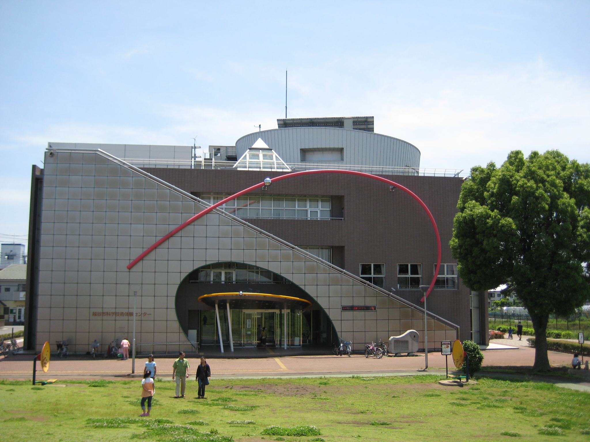 越谷市科学技術体験センター ミラクル